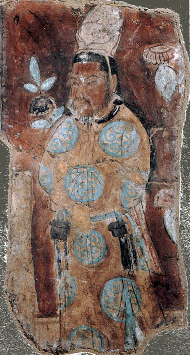 Uigurenfürst, Wandmalerei aus Bezeklik (Tarimbecken, bei Turfan) 8./9. Jahrhundert